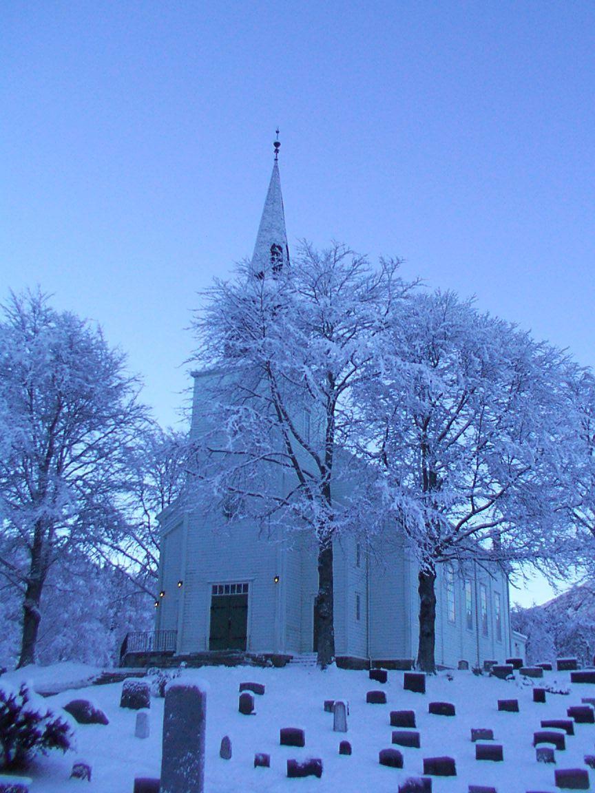 Førde kyrkje ein kald vinterdag 2000, Roy Henning Helle